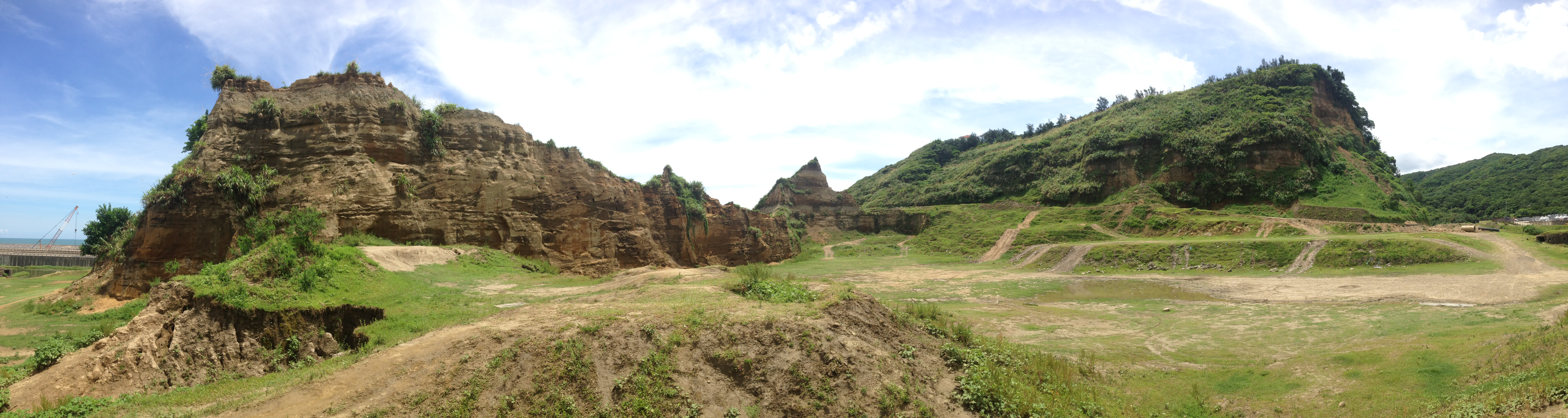 中文（台灣）: 林口大峽谷全景